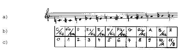 Kaksteisthelirida noteerituna kolmel erineval moel: a) noodikirjas, b) tähemärkidena, c) arvnotatsioonis C = 0, Cis/Des, D = 2 jne.)